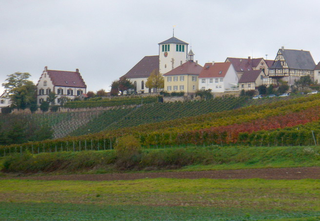 Sachsenheim-Hohenhaslach /Germany selbst fotografiert am 23.10.2005 von user:Enslin